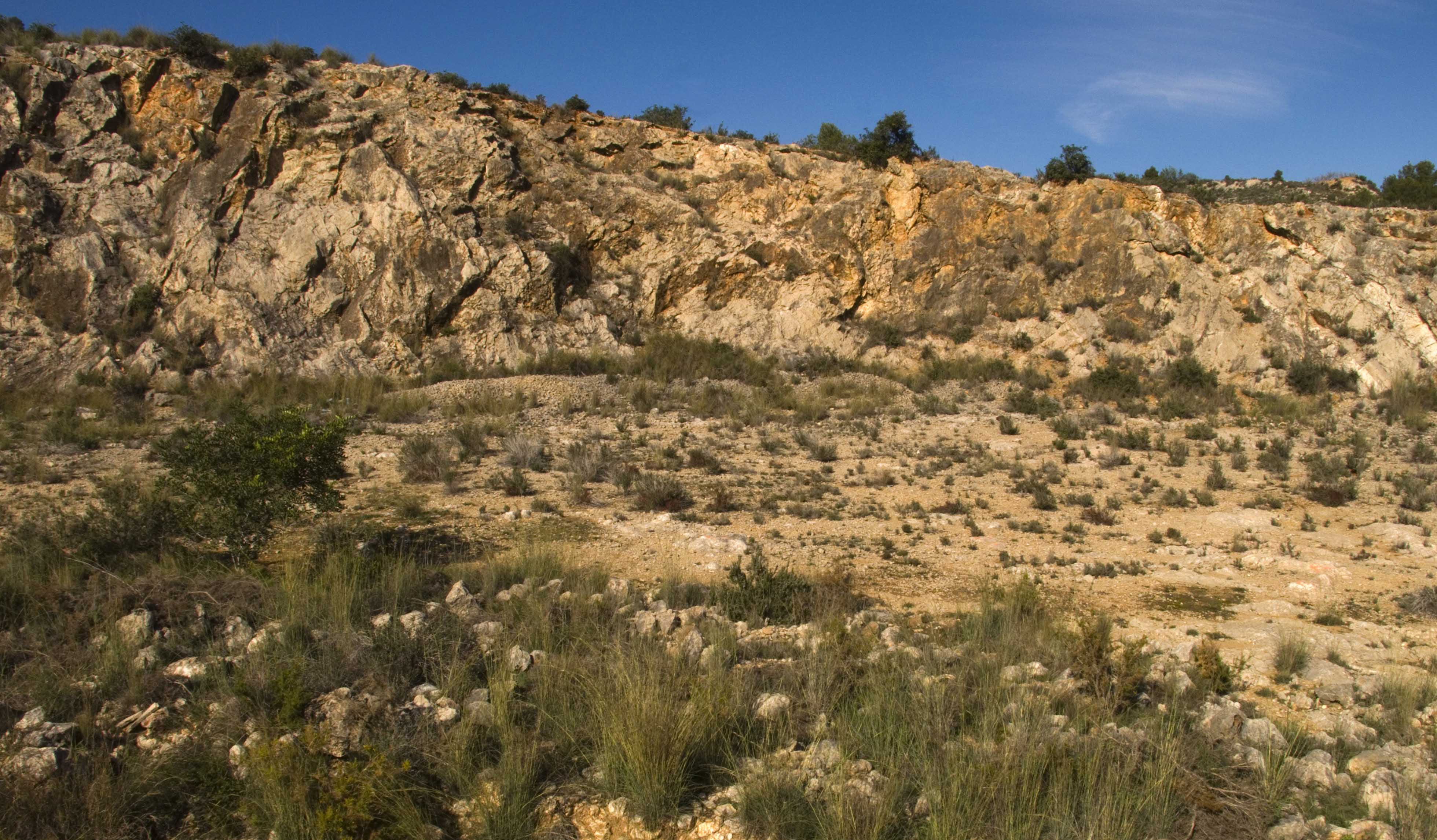 Part de les pedres de les Torres de Serrans o Porta de Serrans de València venen d'aquesta pedrera, on neix el Barranc del Senyor de la conca del Xúquer.